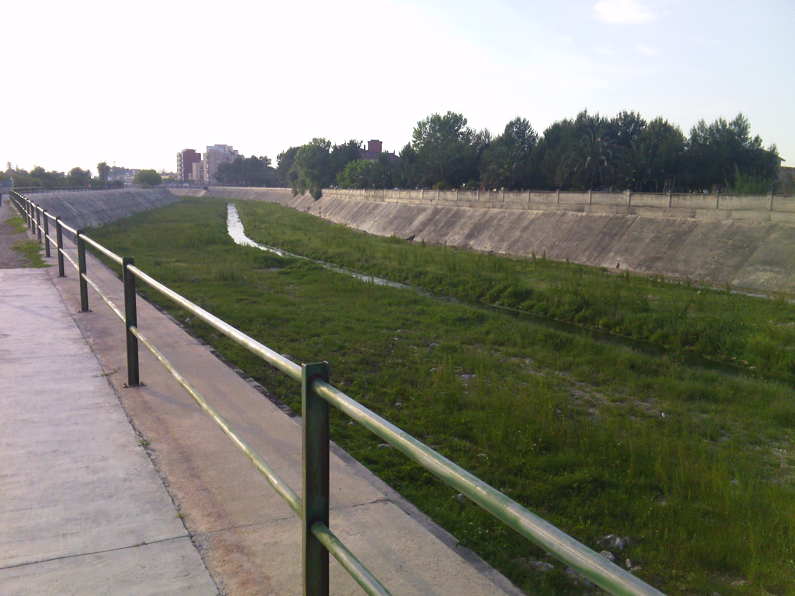 Río Magro a su paso por el término municipal de Algemesí.